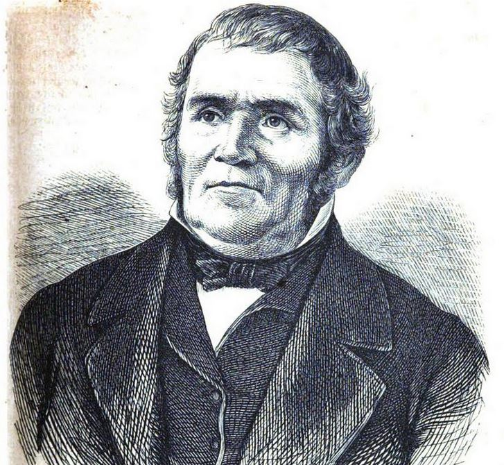 Jakob Keller Glockengiesser, Zürich, Schweiz: 1793-1867